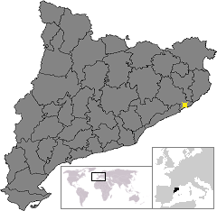 Localització de Lloret de Mar. Location of Lloret de Mar in Catalonia.